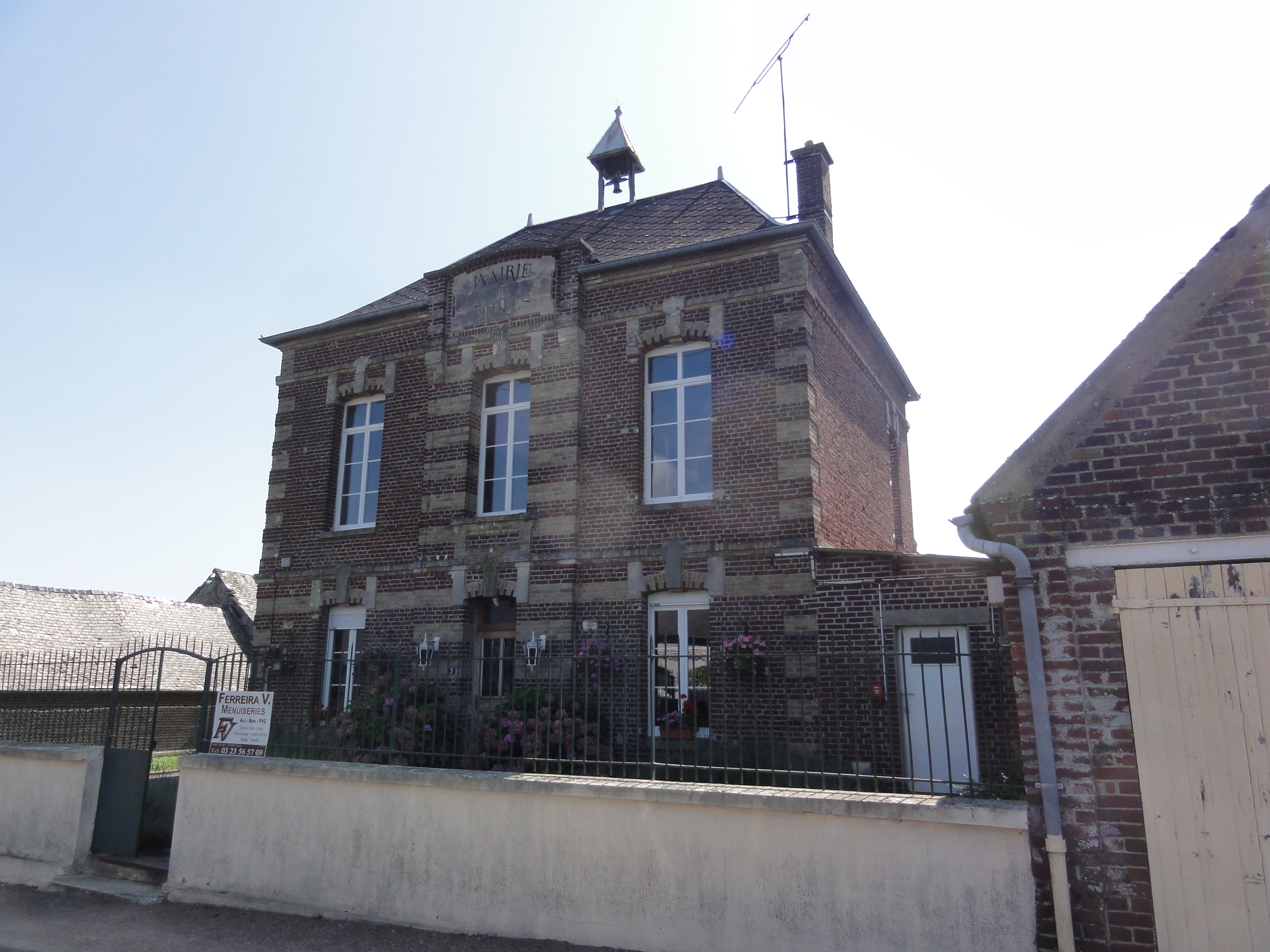 Ugny-le-Gay (Aisne) mairie-école